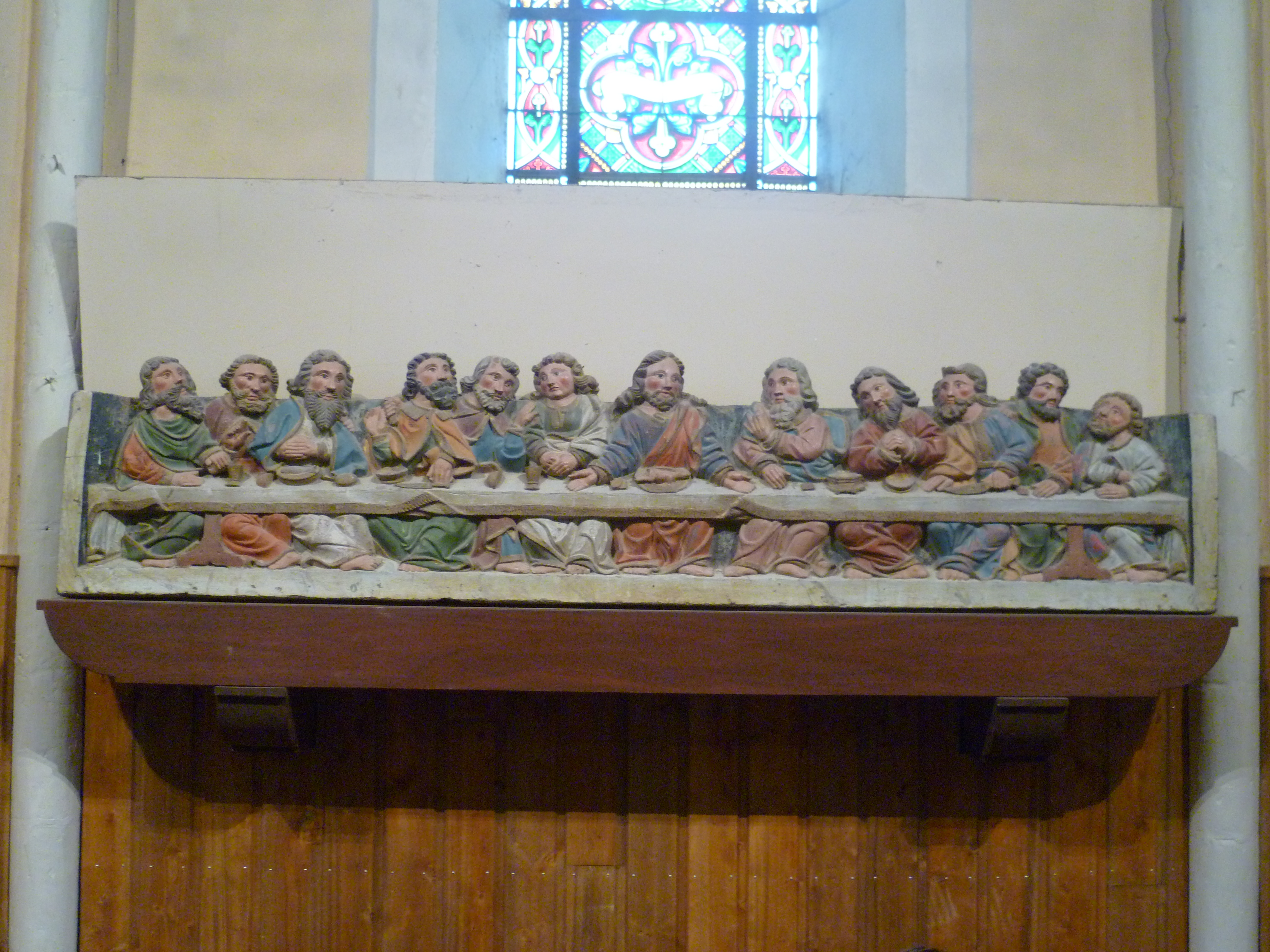 dans l'église de St Barnabé